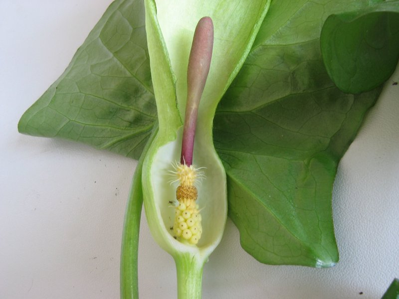 Detailaufnahme der Blüte des Gefleckten Aronstabes Arum maculatum